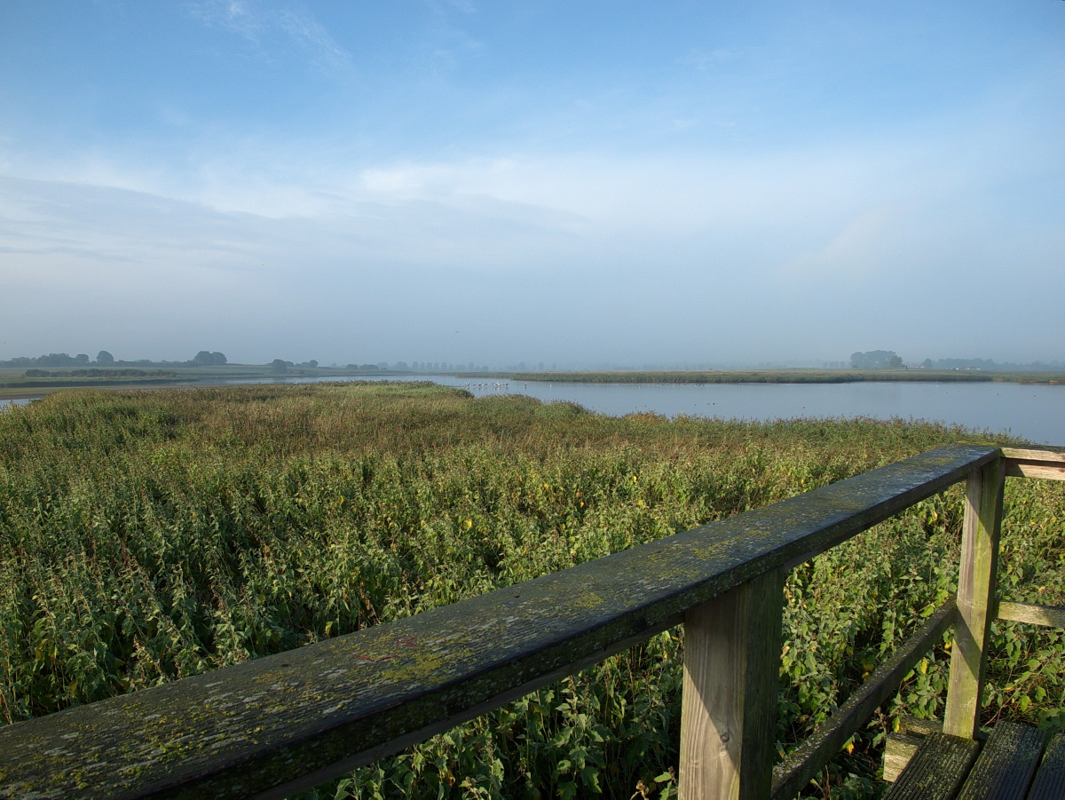 Aussicht von der Beobachtungsplattform im NSG Sehlendorfer Binnensee und Umgebung, Schleswig-Holstein